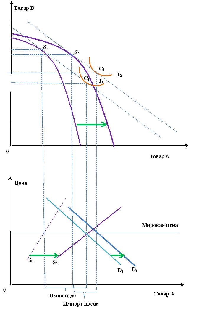 Импортозамещающий рост